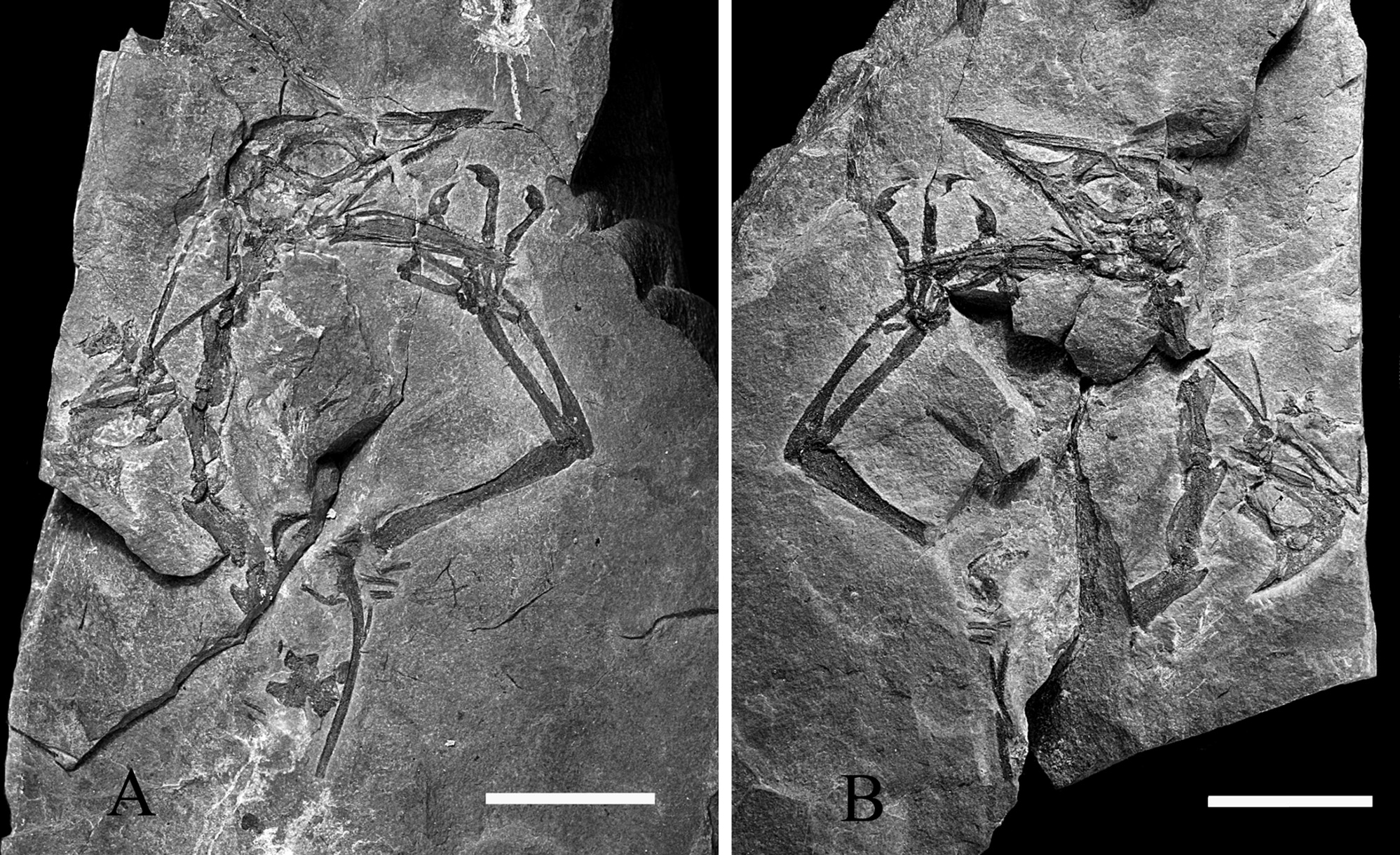 Megalancosaurus preonensis holotype.